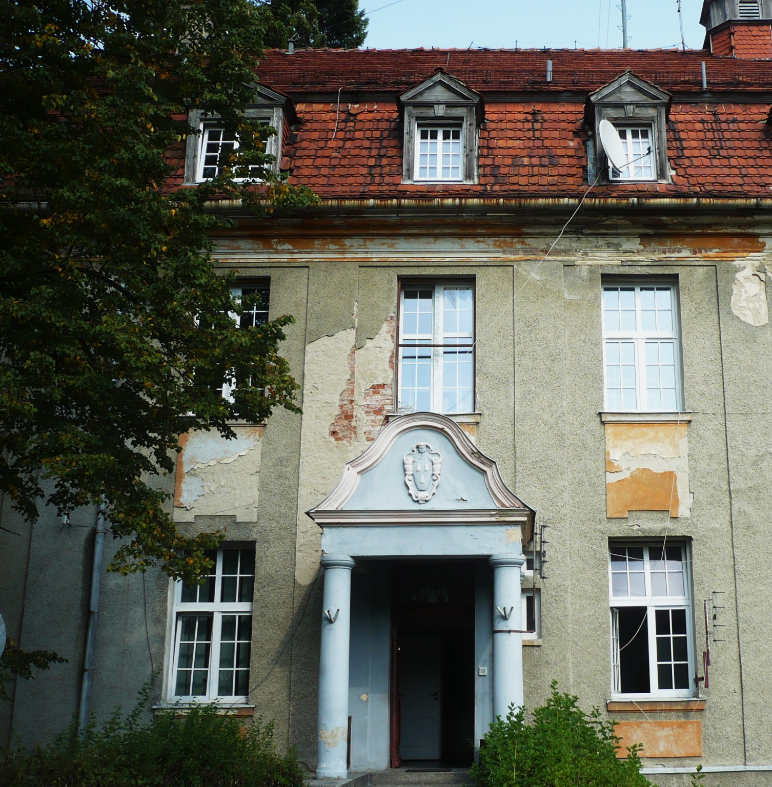 Nowa Ruda, ul. Szpitalna 2 - Szpital bracki (górniczy), 1911